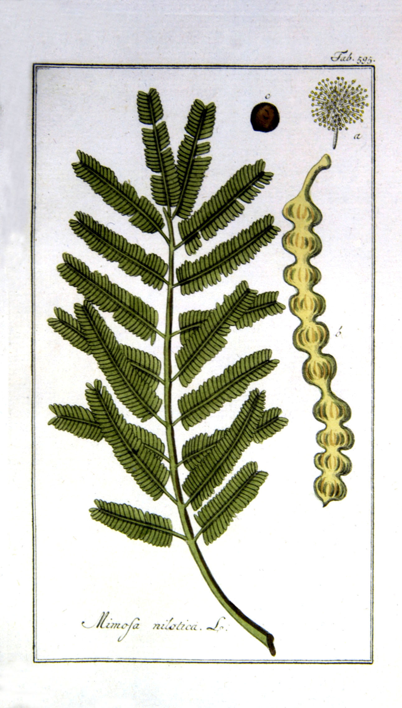 Mimosa nilotica Tafel 595 Zorn, J., Oskamp, D.L., Afbeeldingen der artseny-gewassen met derzelver Nederduitsche en Latynsche beschryvingen (1800)